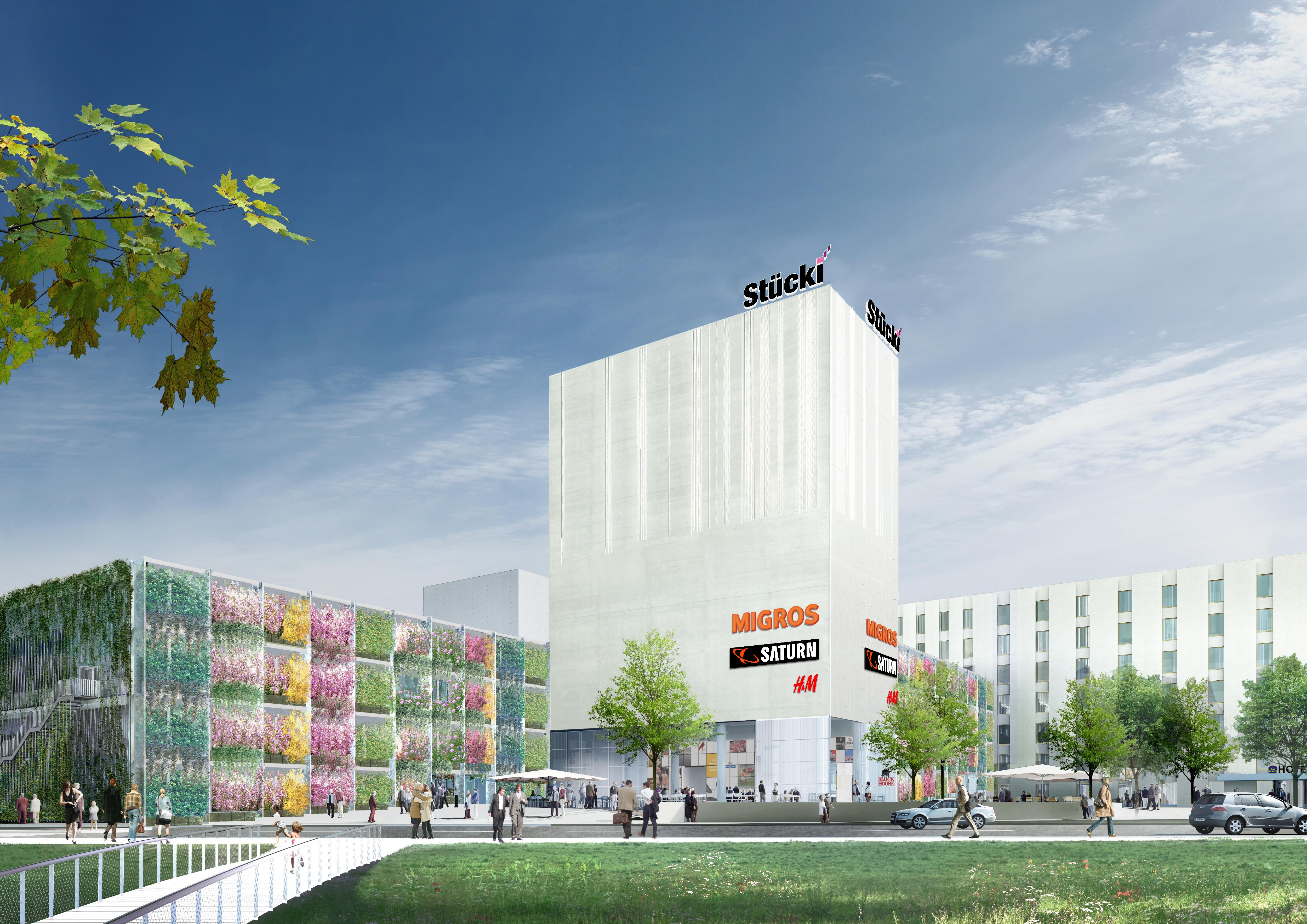 Gebäudeansicht des Stücki Shopping